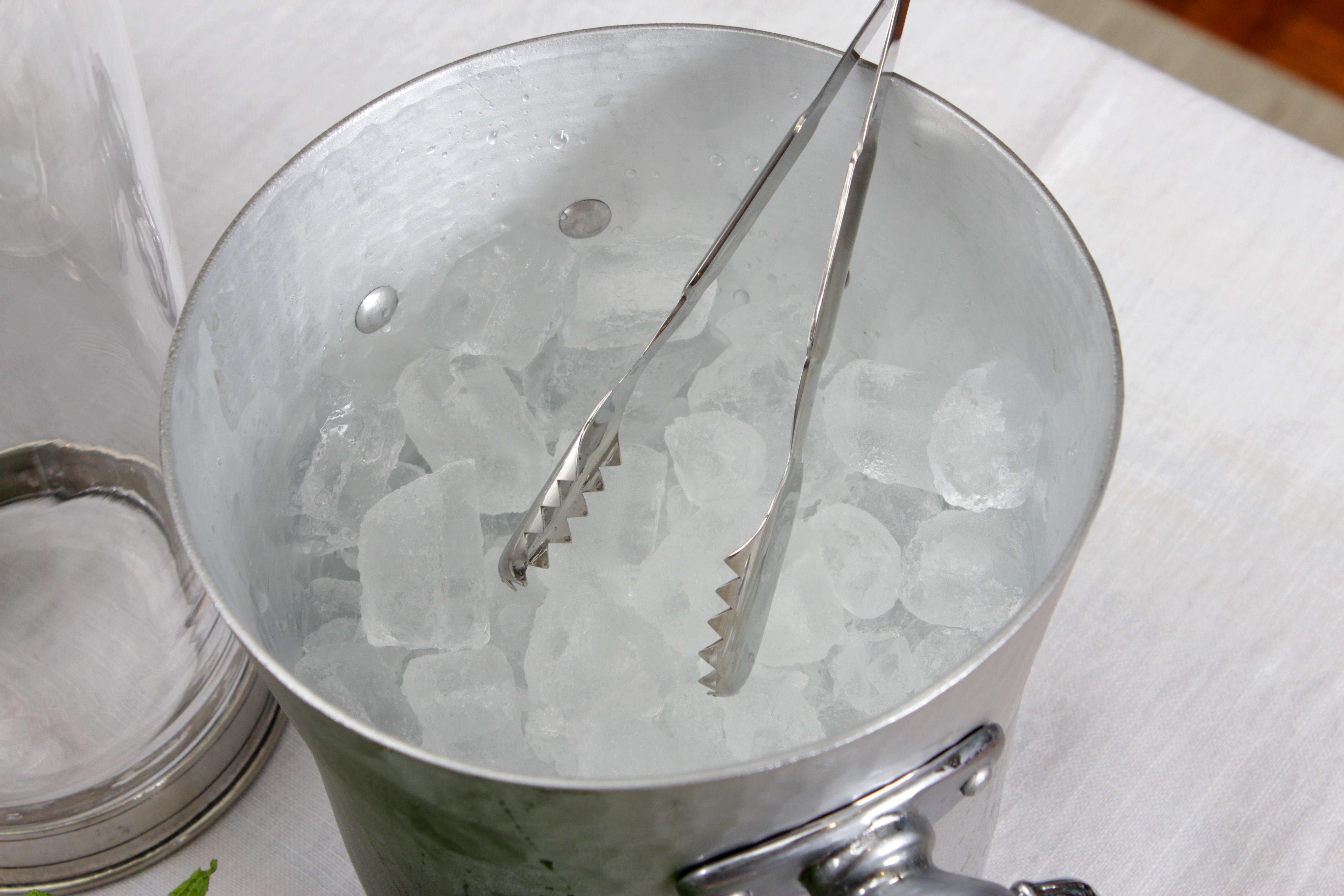 Mauviel M30 Aluminum Ice Bucket